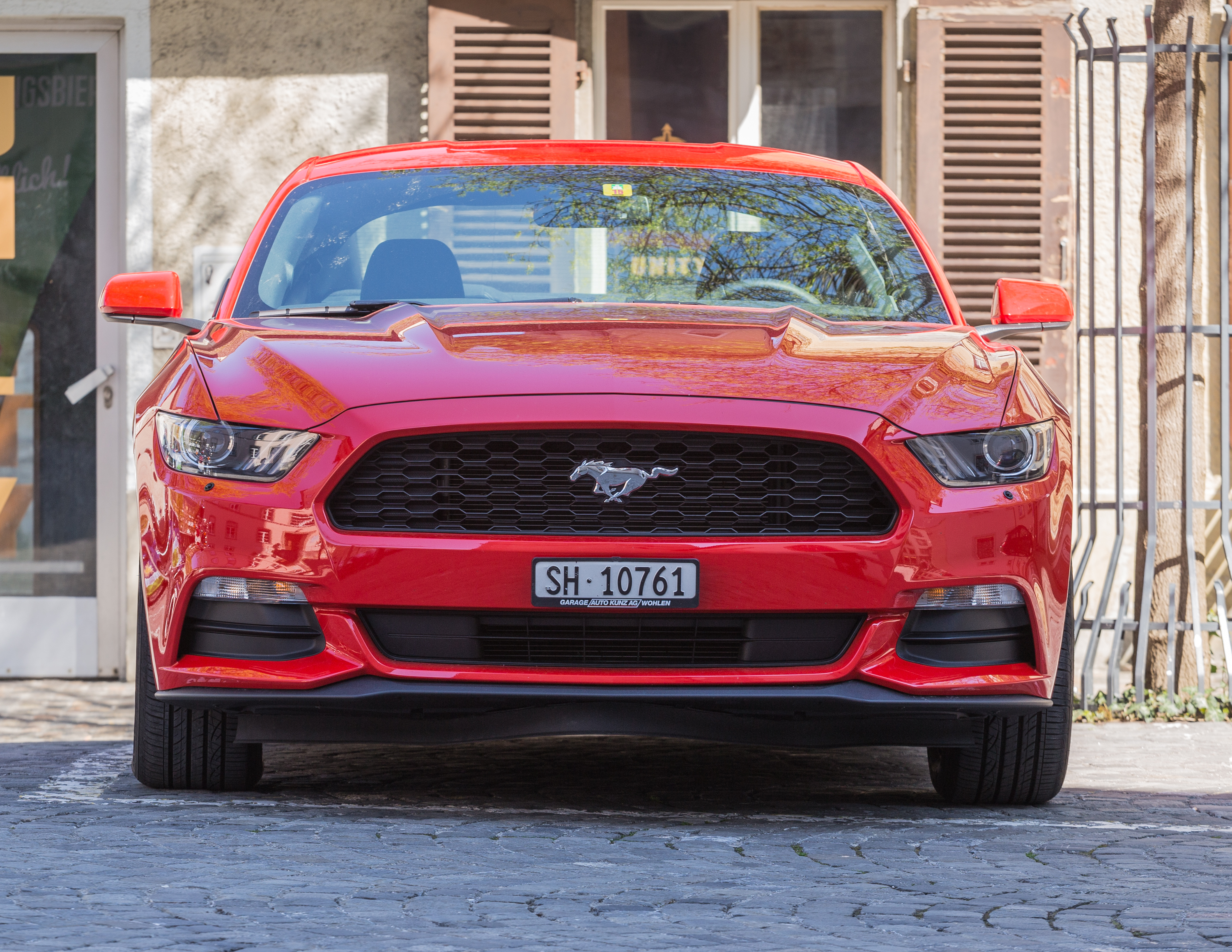 Ford Mustang (2015)